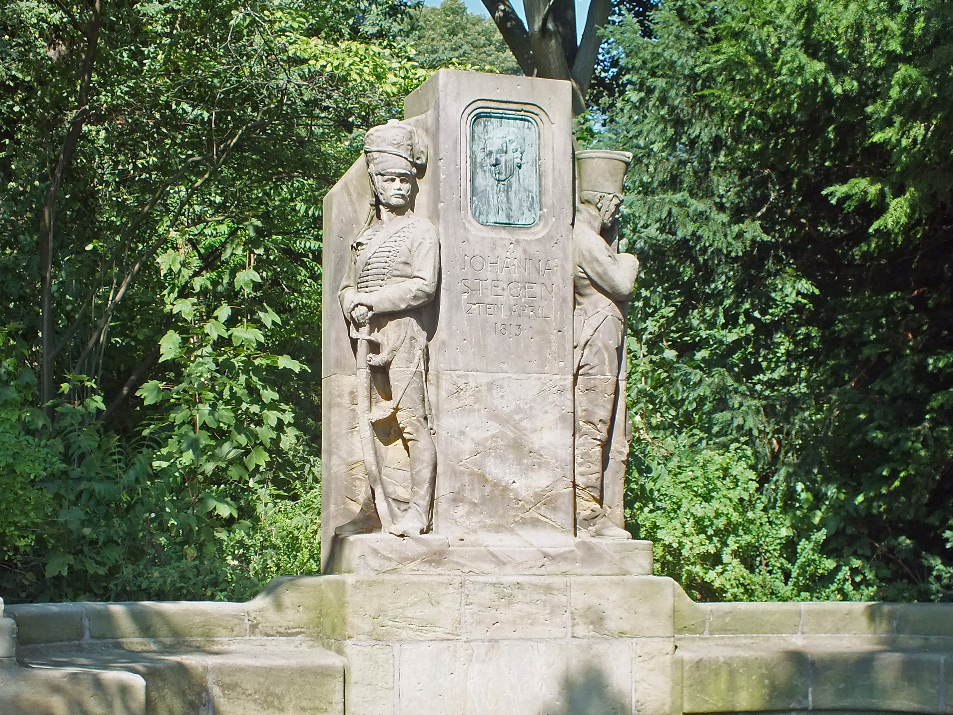 Das Johanna Stegen-Denkmal von Karl Gundelach in Lüneburg